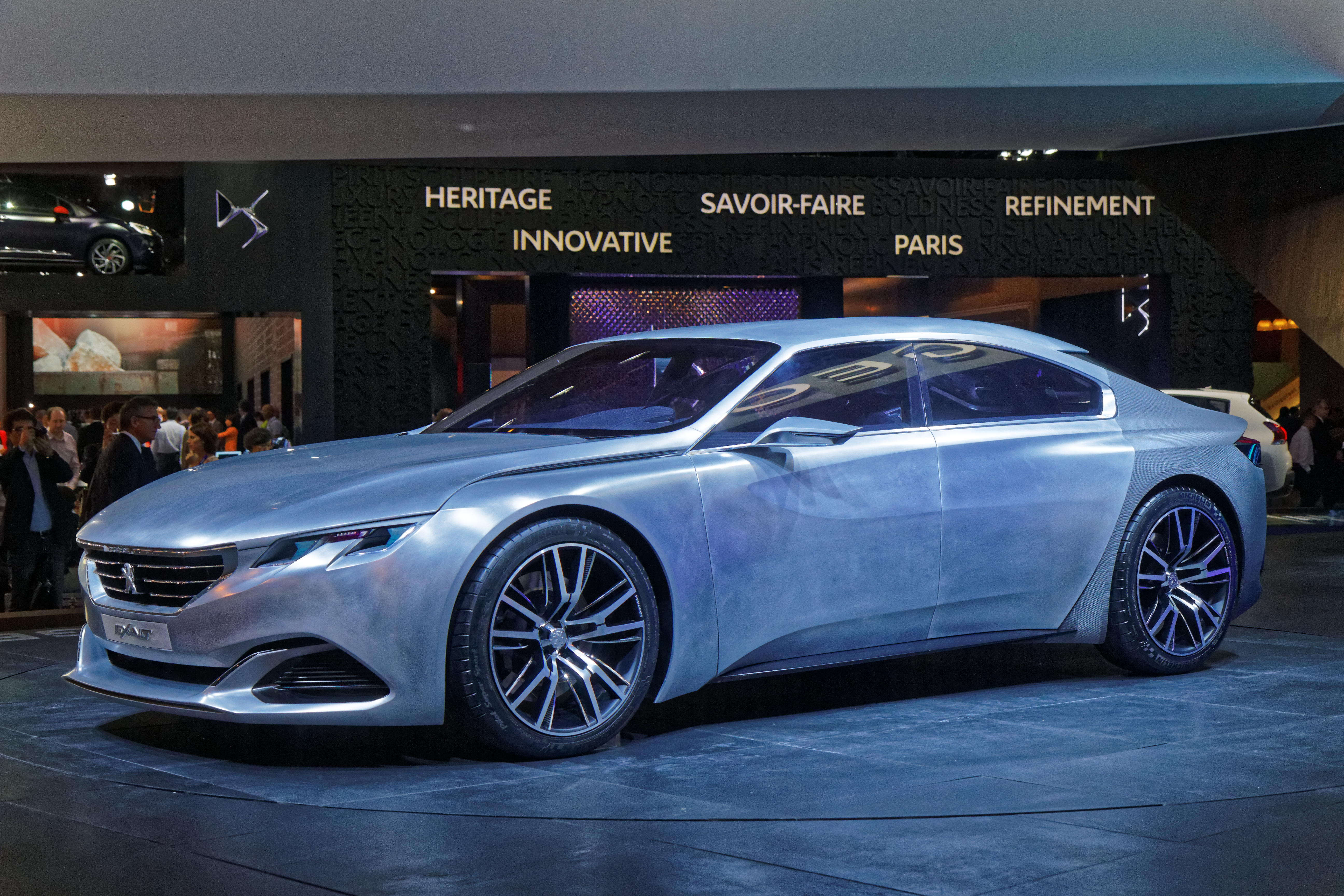 Une Peugeot Exalt présentée lors du mondial de l'automobile de Paris 2014.